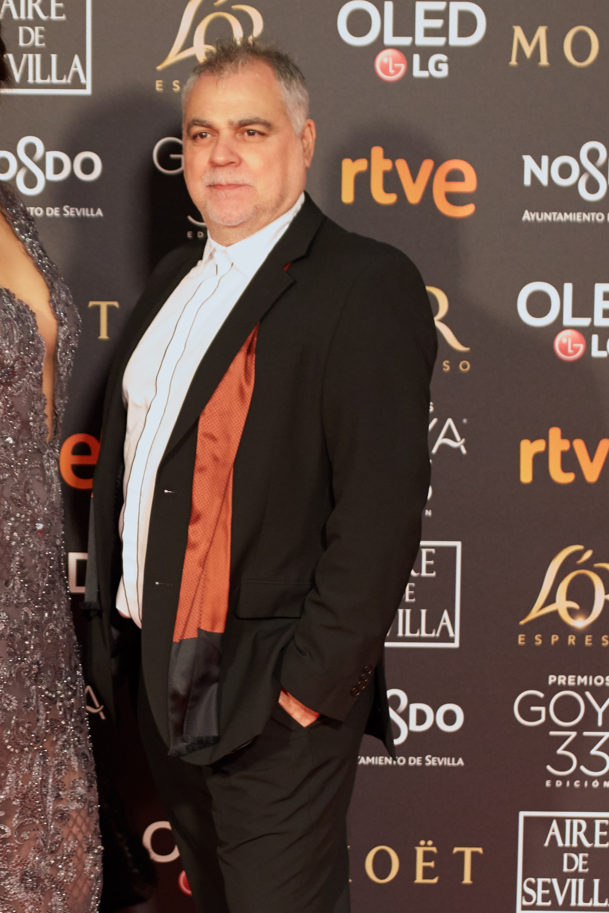 Benito Zambrano en la alfombra roja de los Premios Goya celebrados en Sevilla en Febrero 2019